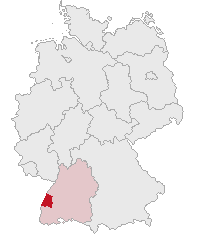 Ortenaukreis, Baden-Württemberg